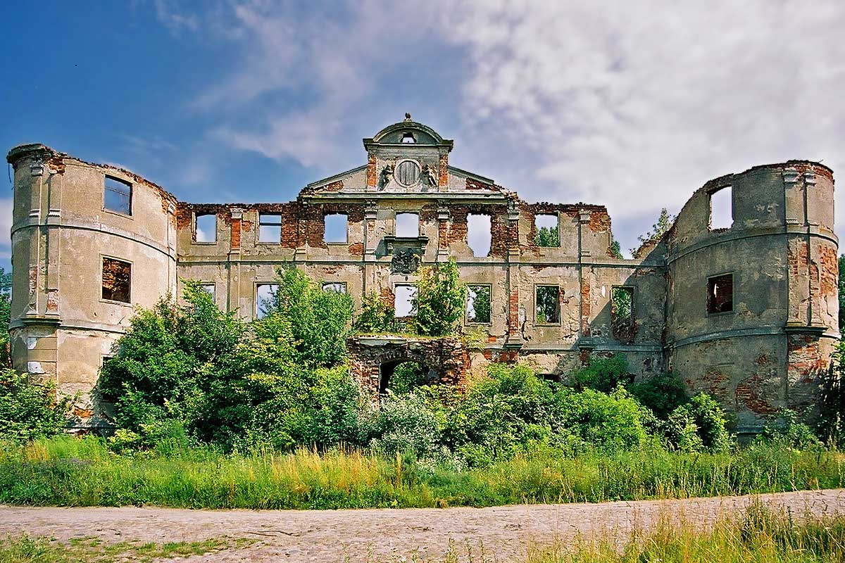 Zamek w Czerninie